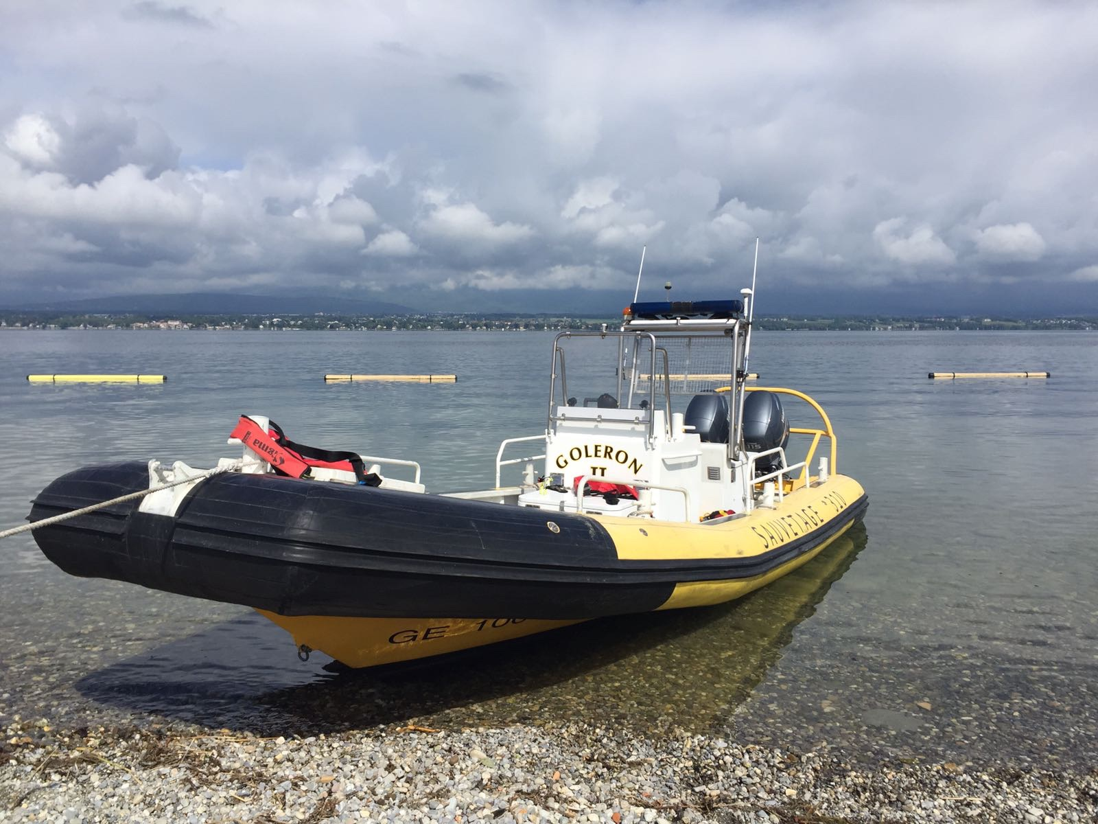 Le Lemano 310 accosté sur la plage d'Hermance, lors de l'exercice CoHerAn 2017